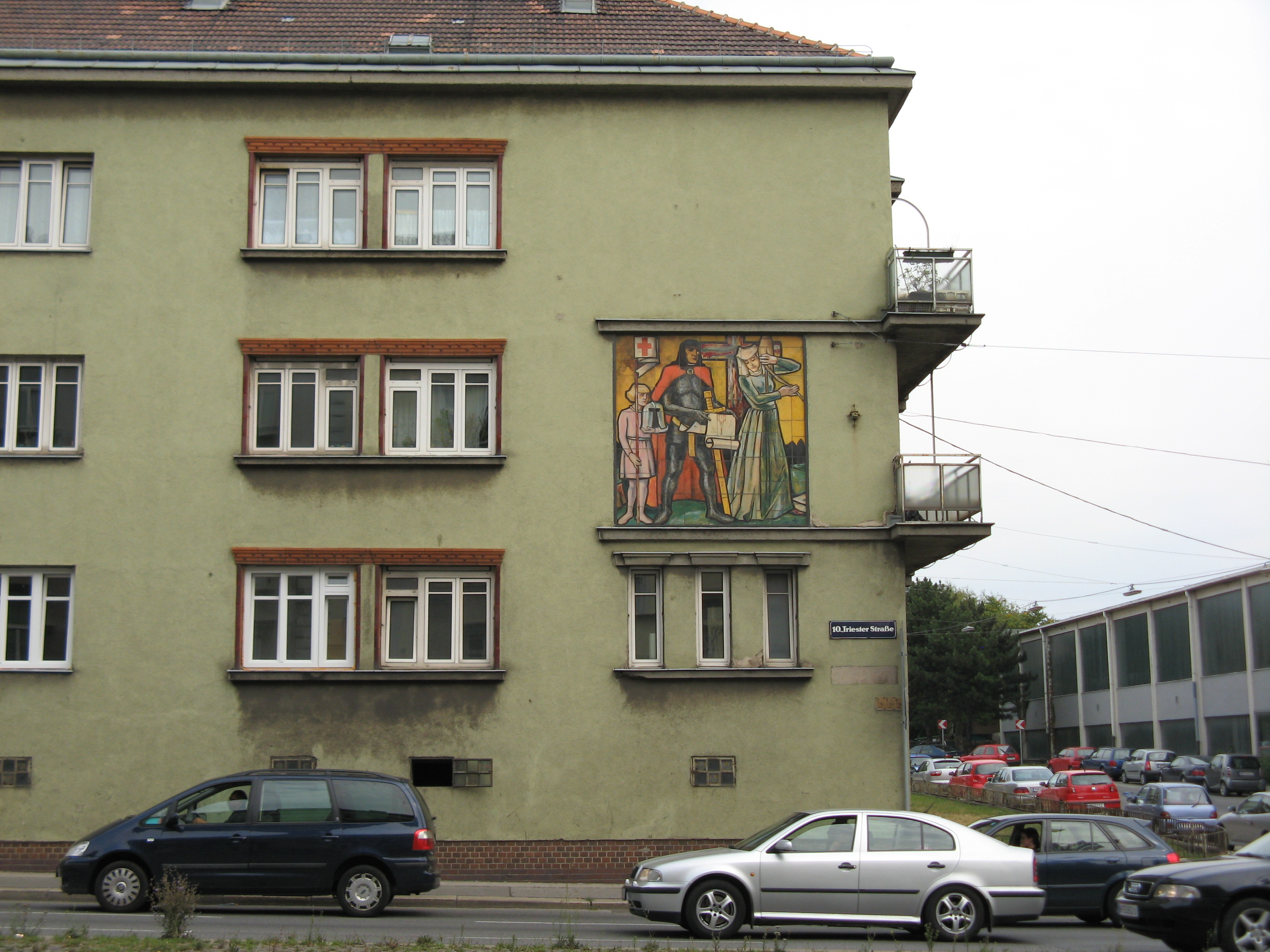 Wohnhausanlage Triester Straße 85 (1932/33) von Silvio Mohr und Robert Hartinger mit Kachelbild "Spinnerin am Kreuz", Wien-Favoriten